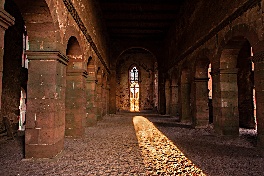 Gotthardruine in Weilbach (Bayern), Innenansicht Ostseite